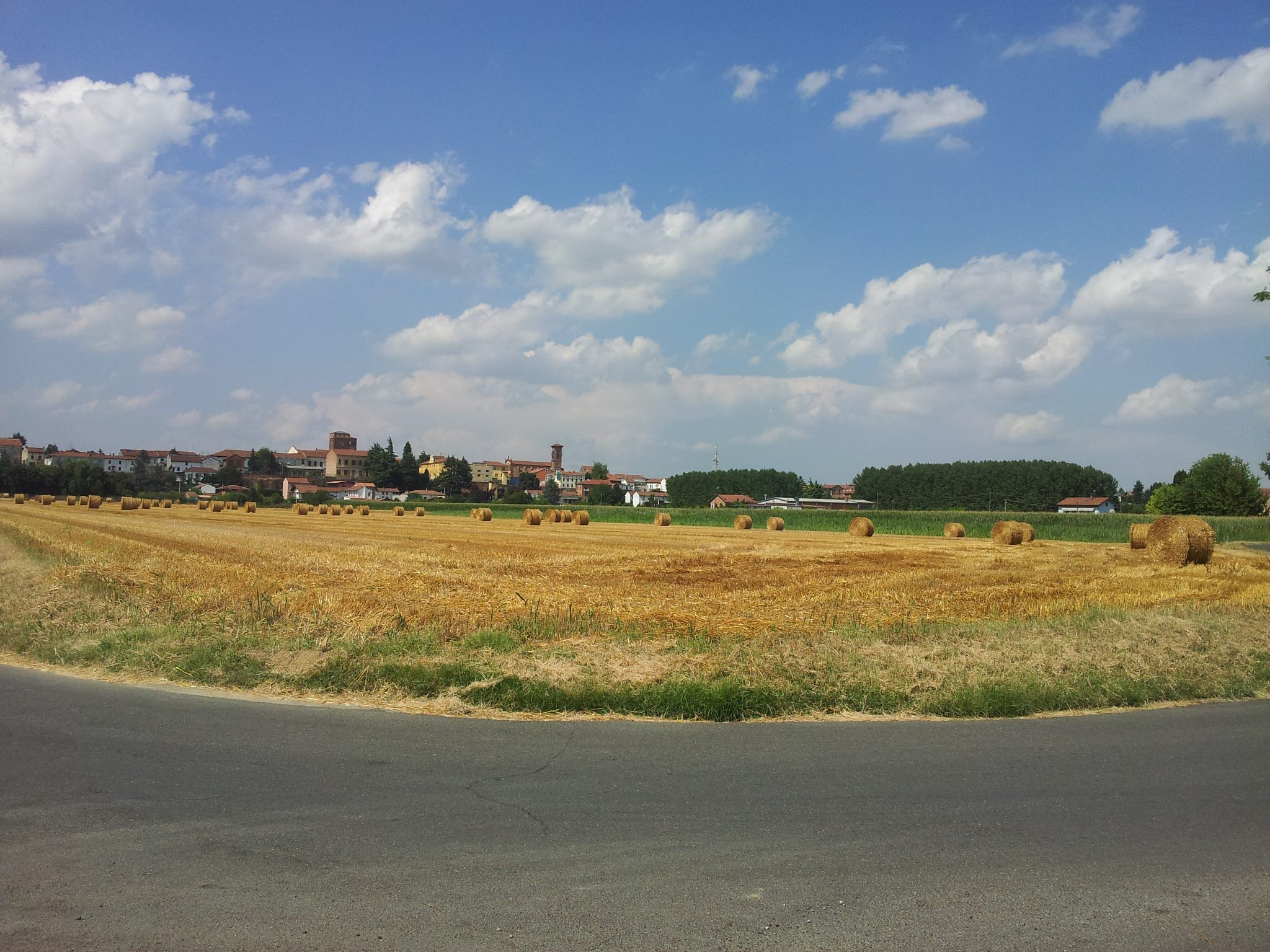 Scorcio di Felizzano visto dalla vecchia circonvallazione